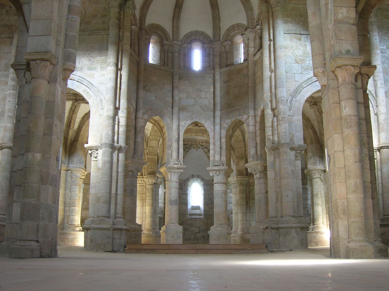 Mosteiro de San Lourenzo de Carboeiro, Silleda, Galicia - Spain'Monasterio de San Lourenzo de Carboeiro'